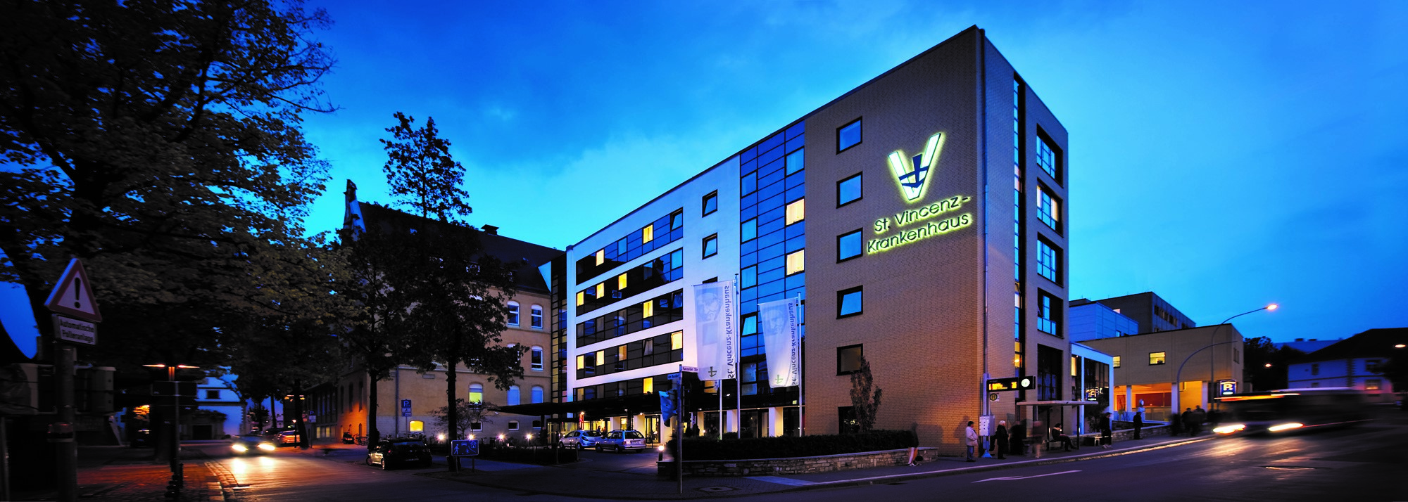 St. Vincenz-Krankenhaus Paderborn - Ansicht von Vorne